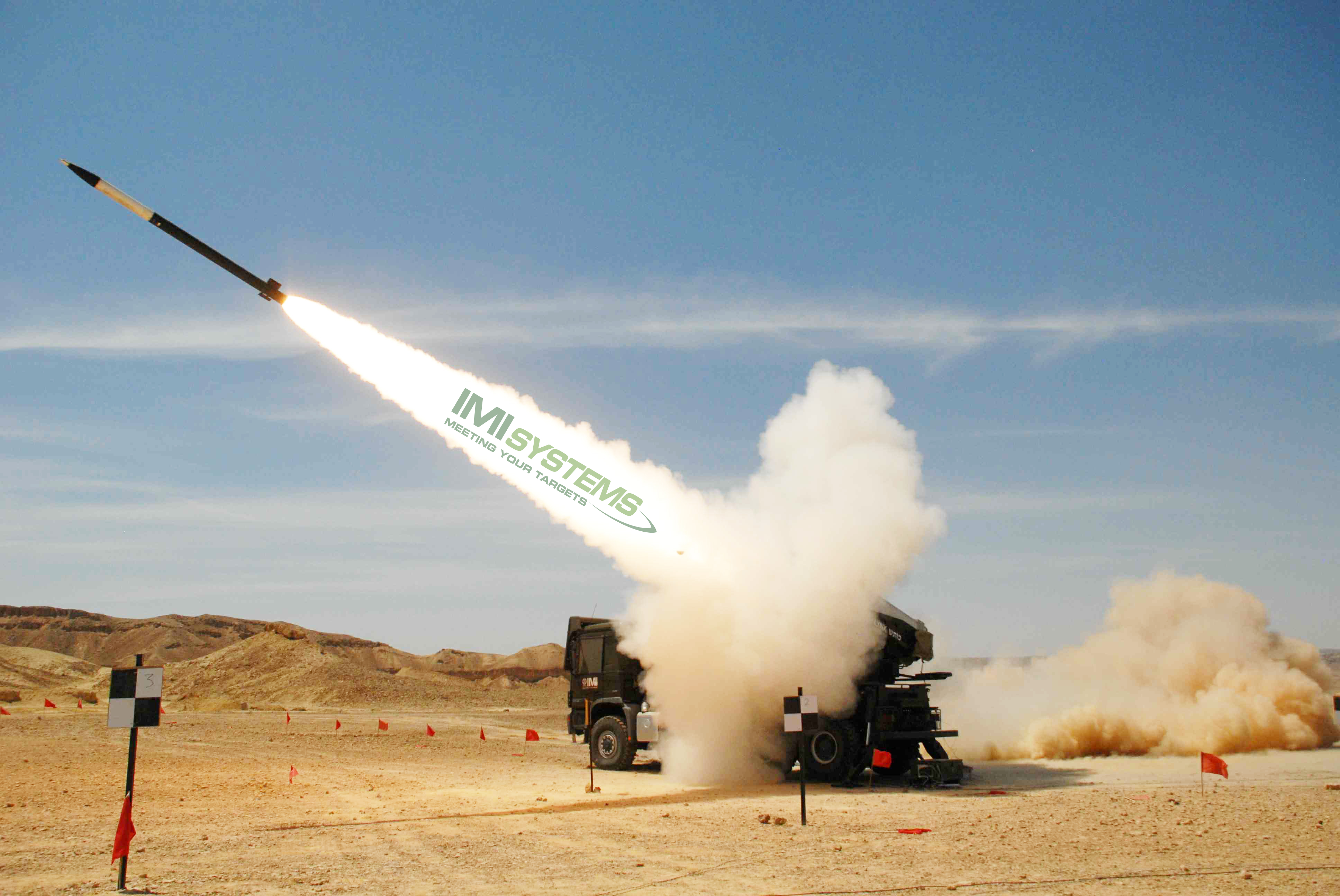 הדגמת ירי כידון קסום